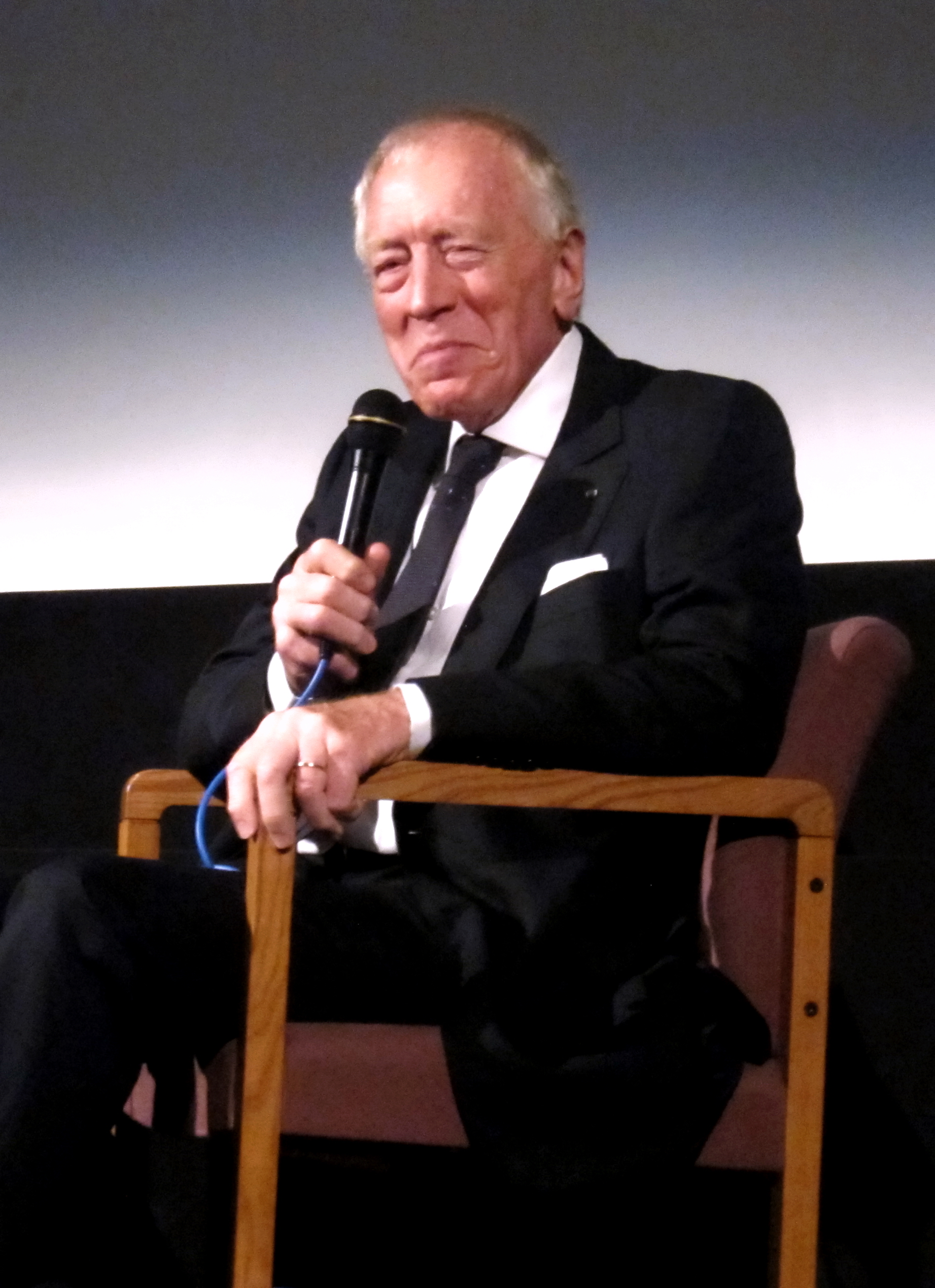 Max Von Sydow